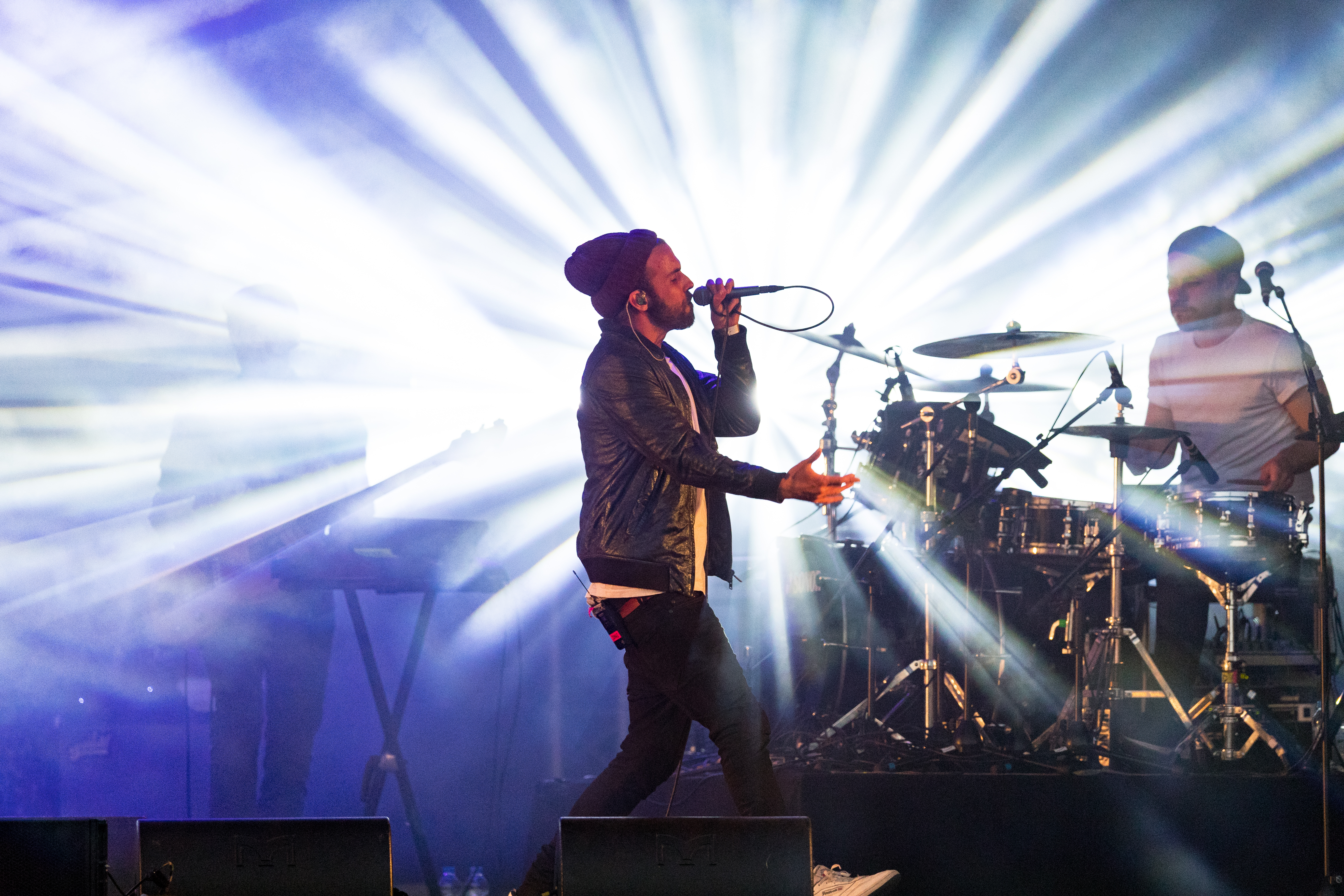 OK Kid during Schlossgrabenfest at , Darmstadt, Hessen, Germany on 2017-05-26, Photo: Sven Mandel